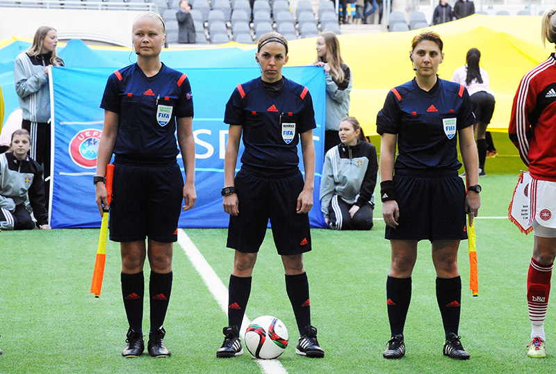 Manuela Nicolosi, Stephanie Frappart, Solenne Bartnik